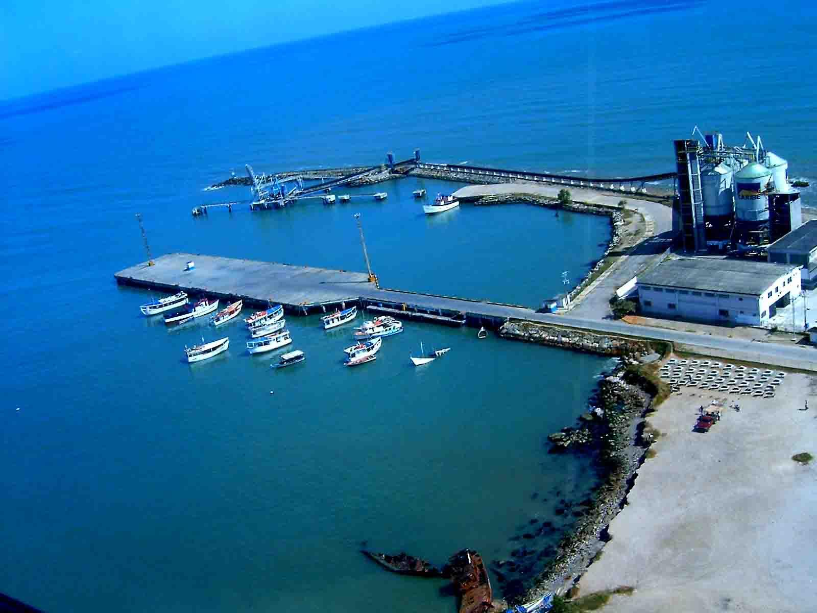 Vista del Puerto de Carúpano